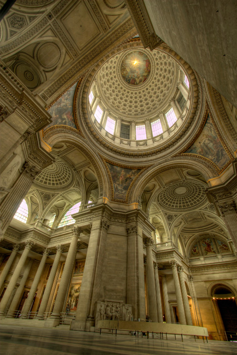 Image impotée de Wikipedia en Image:Pantheon wide angle-kpcdotexposuremanagerdotcom.jpg